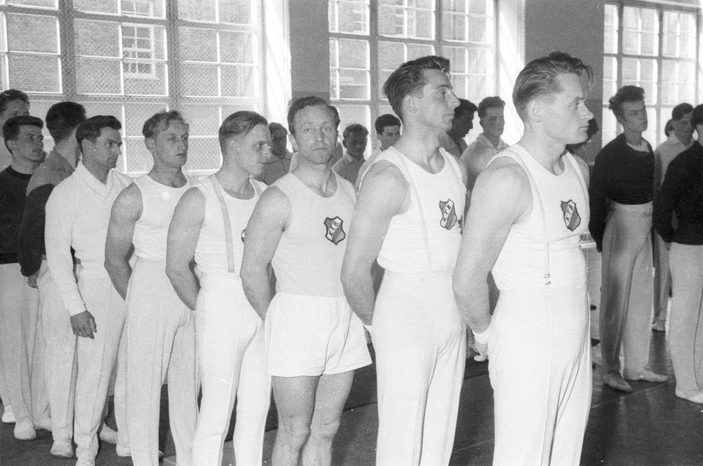 in der Halle der Christian-Albrechts-Universität (CAU). Im Bild die Riege vom Kieler Turnerbund Brunswik (KTB) u.a. mit Erwin Linke (2.v.r.).